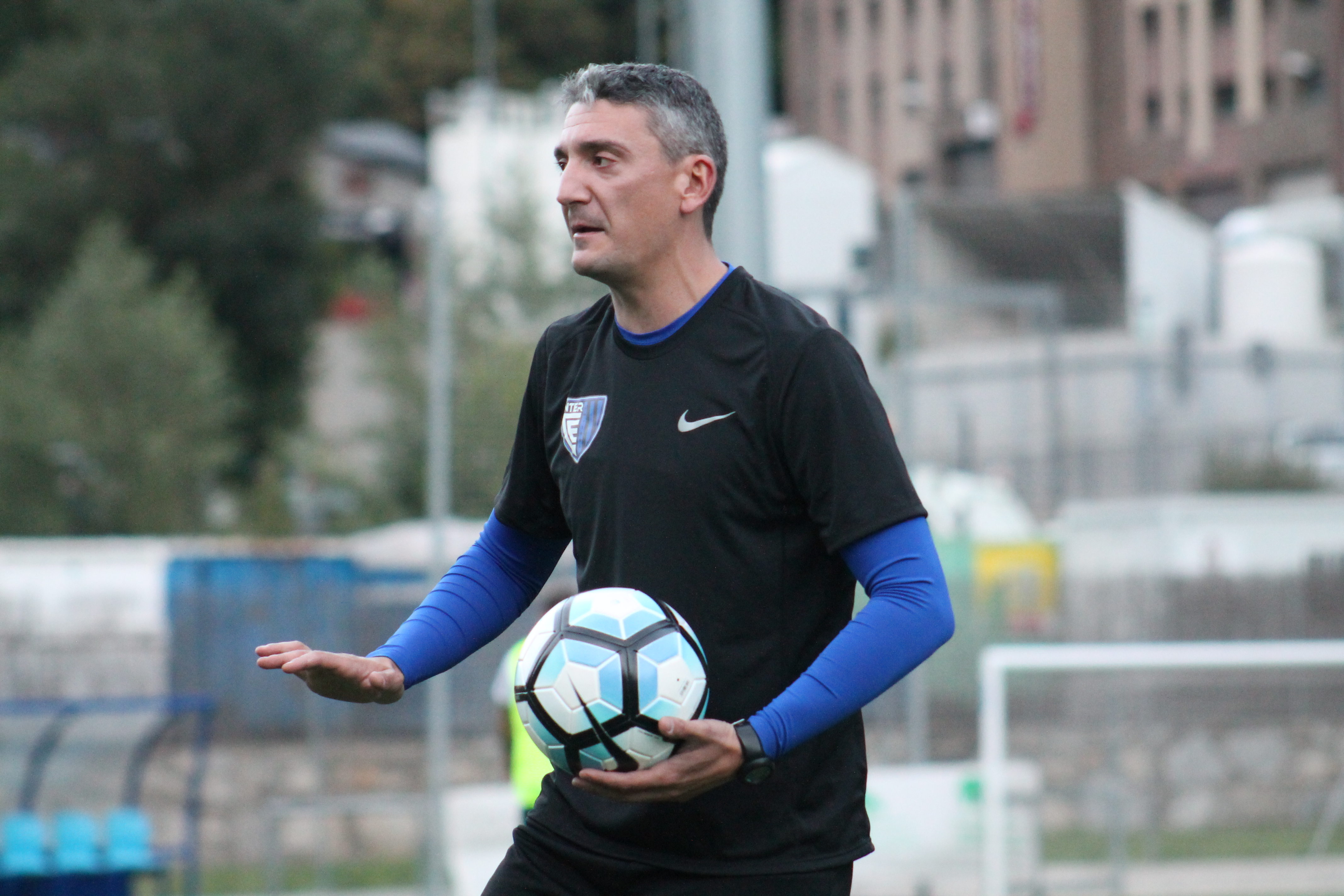 Álex Somoza durante la pretemporada del Inter Club d'Escaldes en 2017